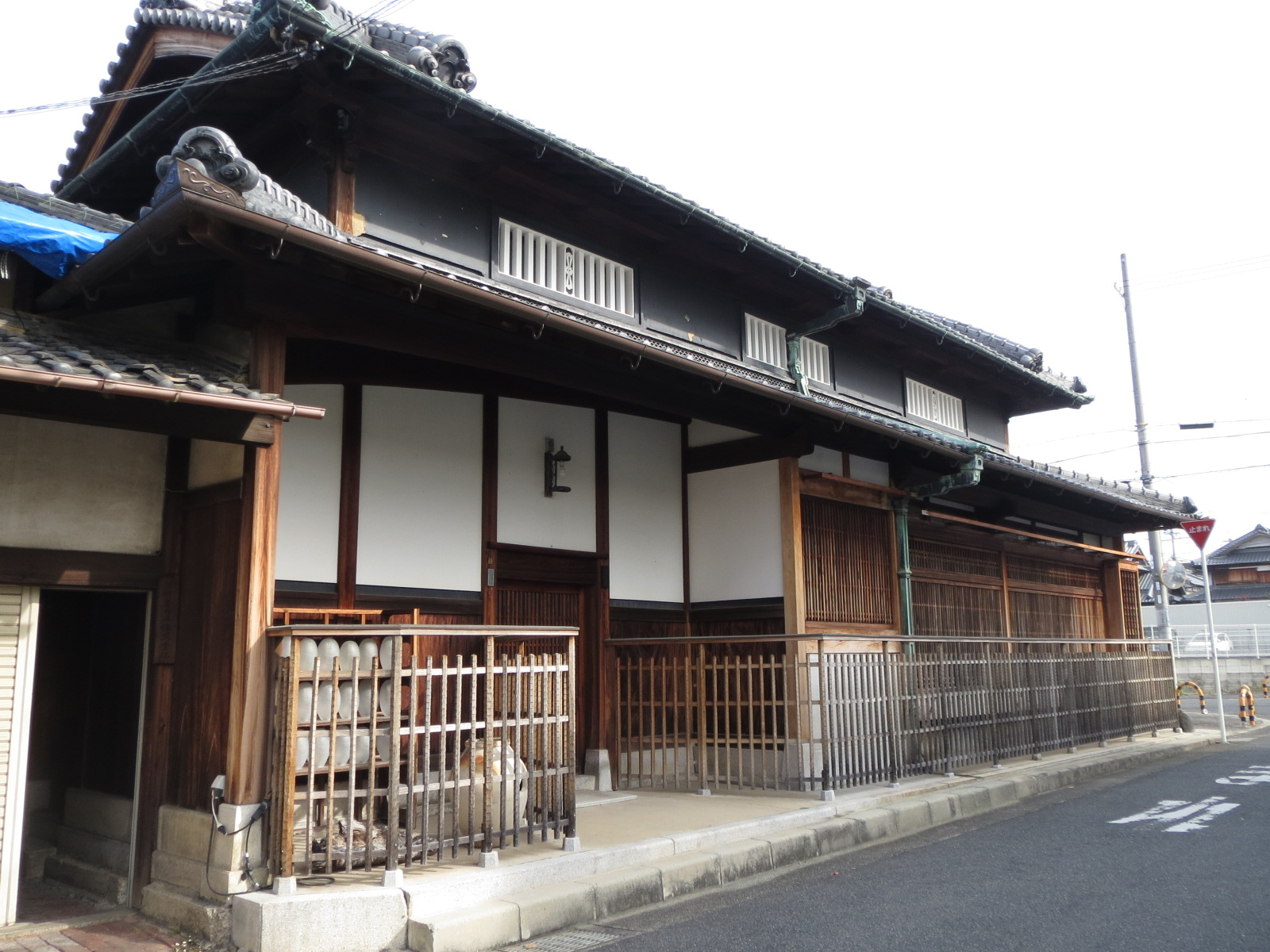 佐竹ガラス主屋